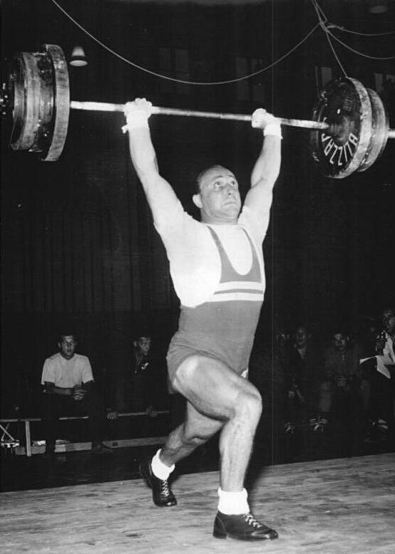 Günther Siebert Zentralbild Kollektiv Fu-Krz. 2.8.1956 In Leipzig begannen die Sportveranstalgunen In der Turnhalle C der DHfK begannen am Donnerstag, dem 2.8.1956, die Wettkämpfe der Gewichtheber. UBz: Den Meister des Sports Günther Siebert (ZSZ Vorwärts Berlin) beim beidarmigen Stoßen.